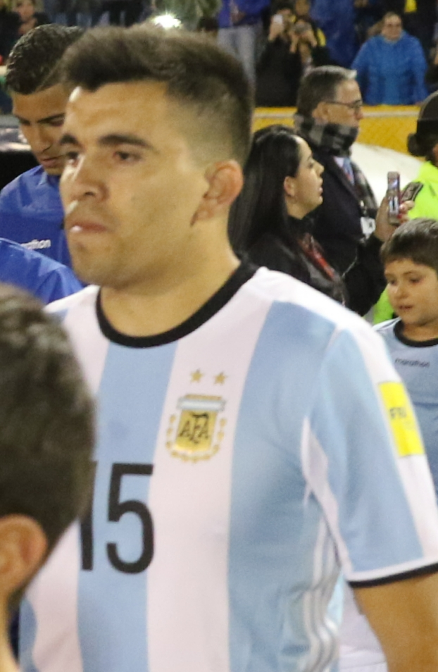 Quito, 10 oct (Andes).- Con tres tantos Argentina espantó los fantasmas de la eliminación, clasificó a su décima octava Copa del Mundo y venció 3-1 a un Ecuador que inició ganando el compromiso, disputado en el estadio Atahualpa de Quito, pero que no supo contener a uno de los mejores jugadores del mundo. ANDES/Micaela Ayala V.